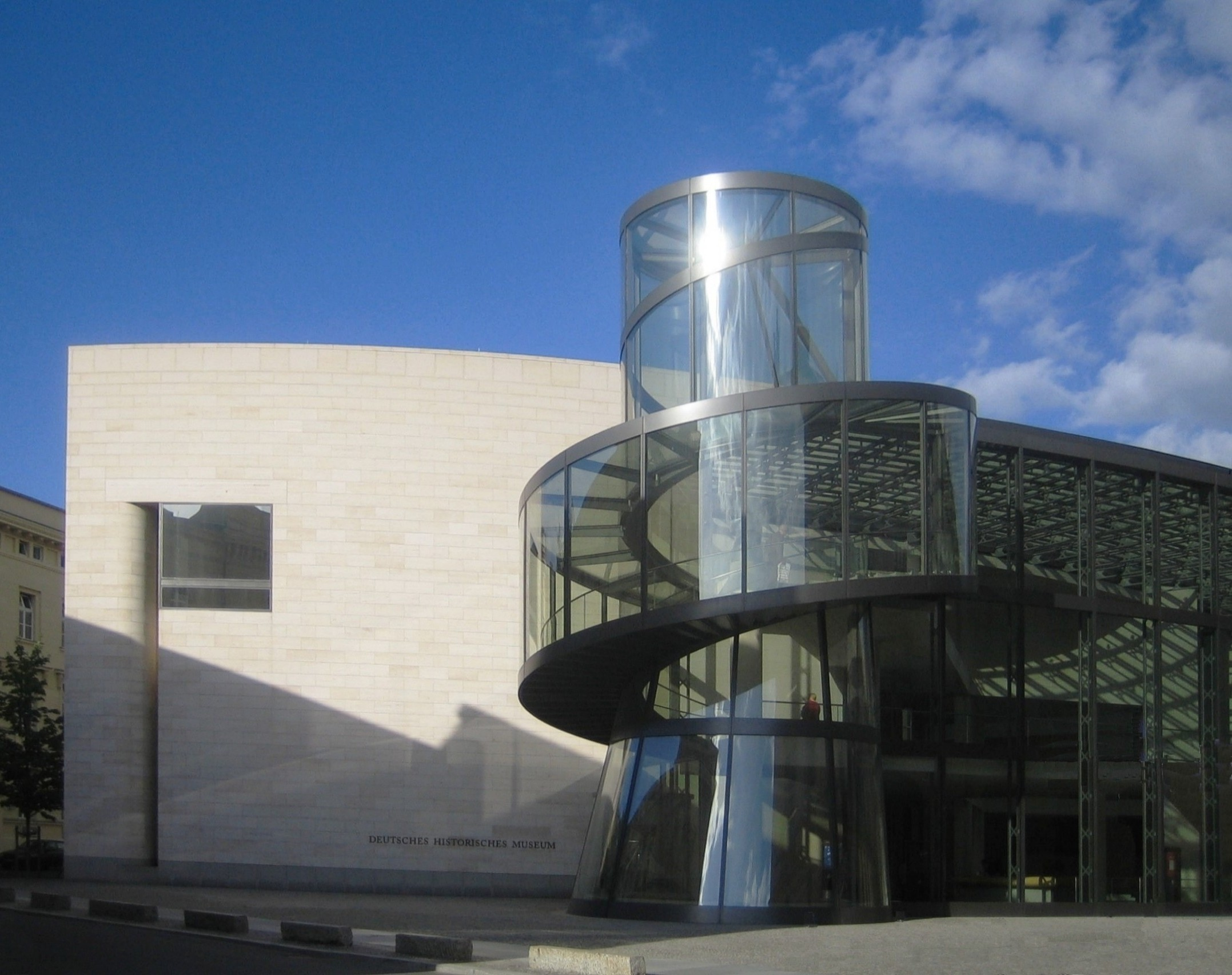 Deutsches Historisches Museum (German Historical Museum) in Berlin. Enlargement-building, architect I. M. Pei. View from Southwest.